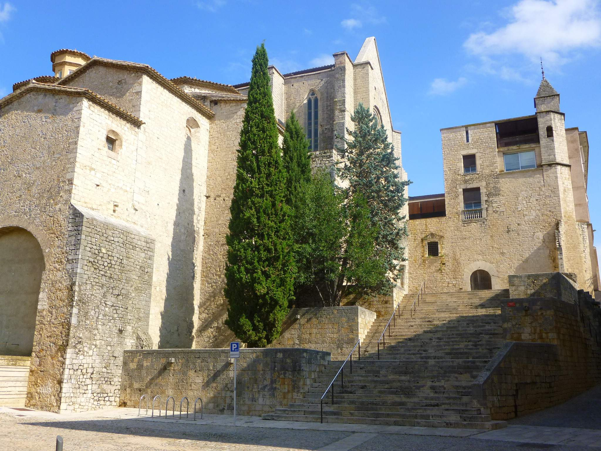 Girona - Convento de Sant Domènec